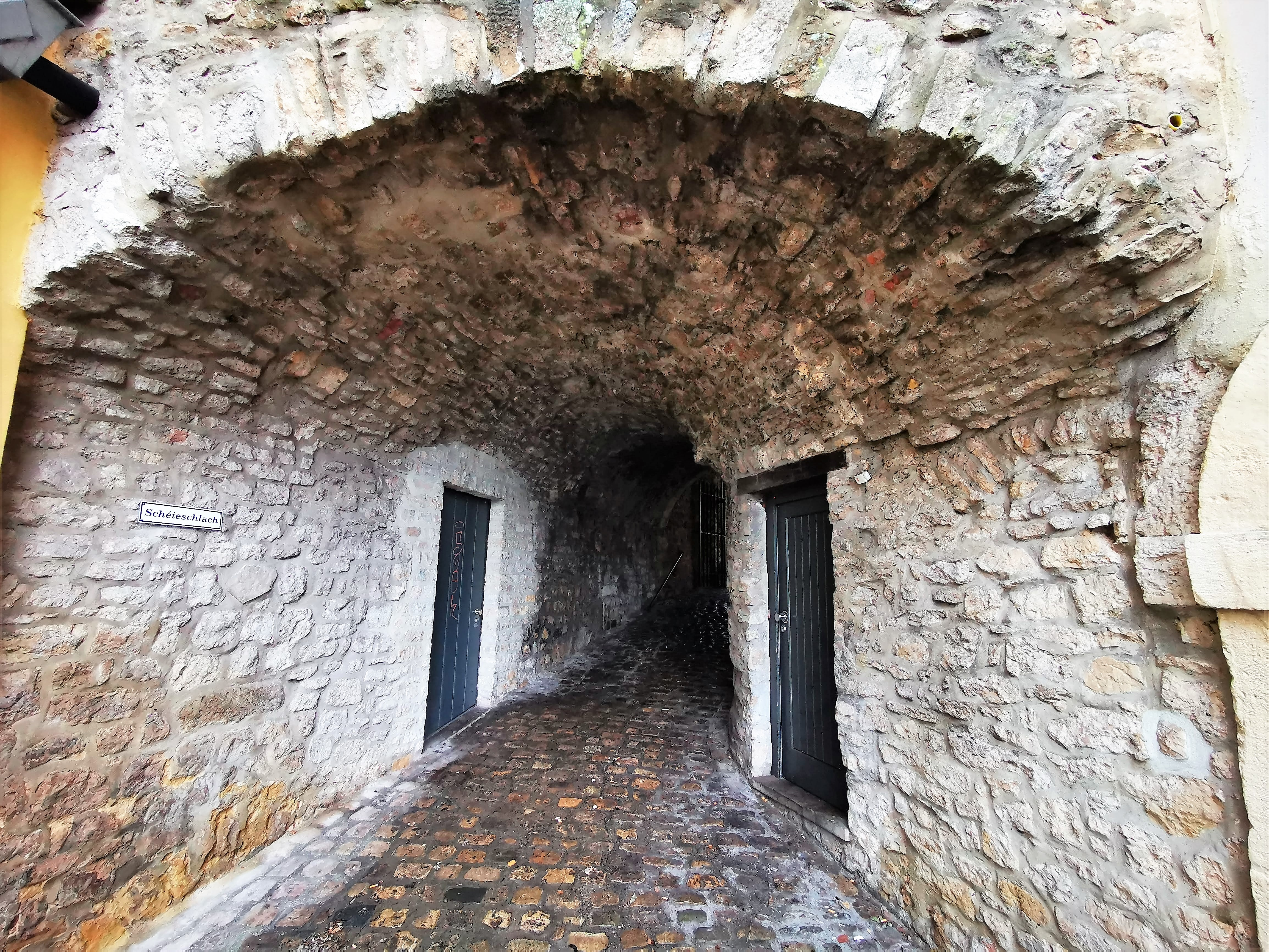 Luxembourg, passage dit Schéieschlach, entre la rue Wiltheim et les remparts du boulevard Victor Thorn.